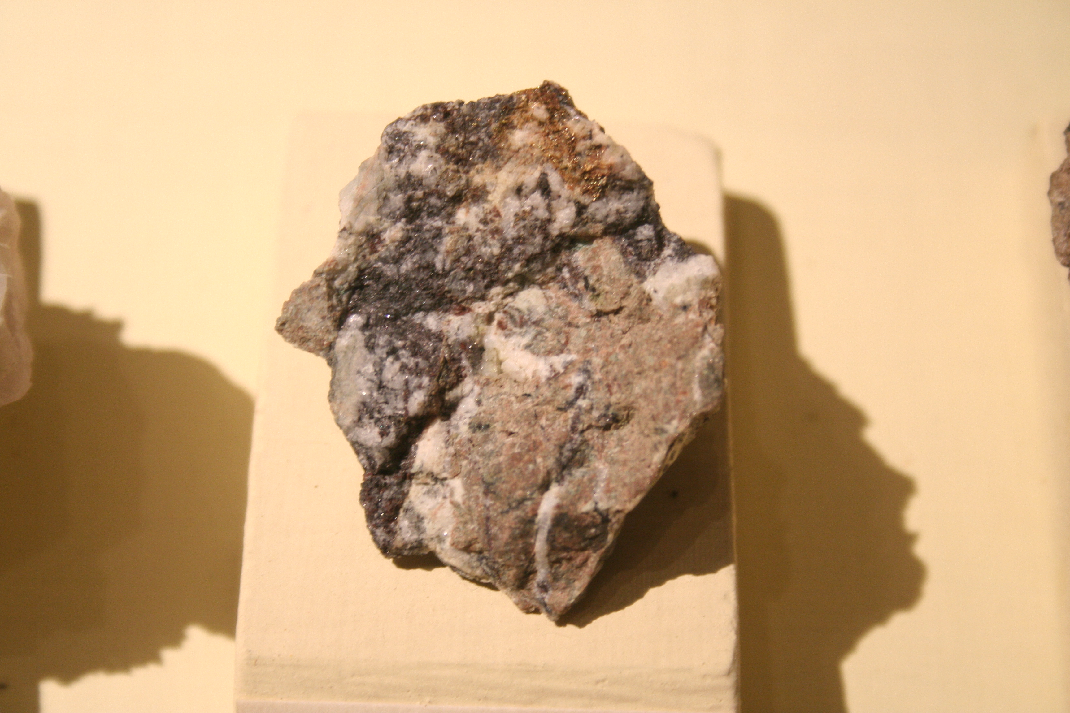 Mckinstryit fotografiert im Museum für Naturkunde Berlin Fundort:Silver City in New Mexico (USA)